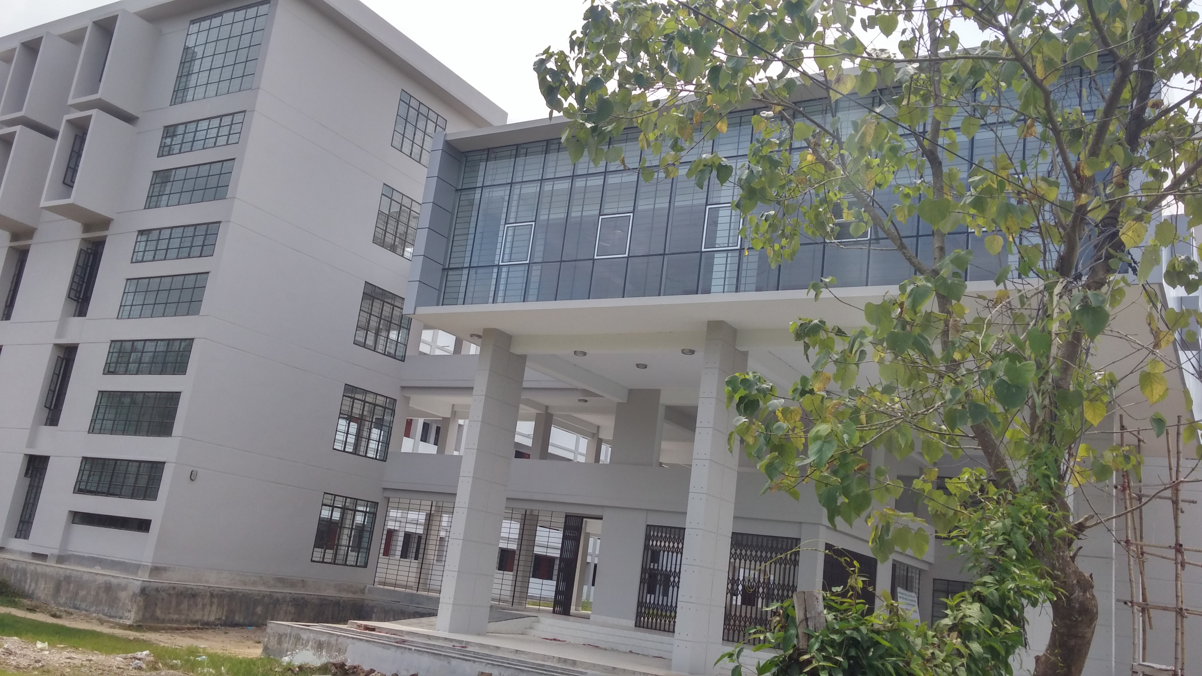 New residential hall for male students.